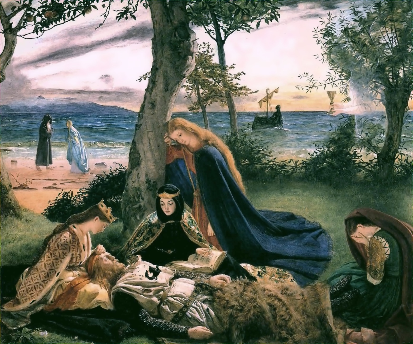 ? × ? cm